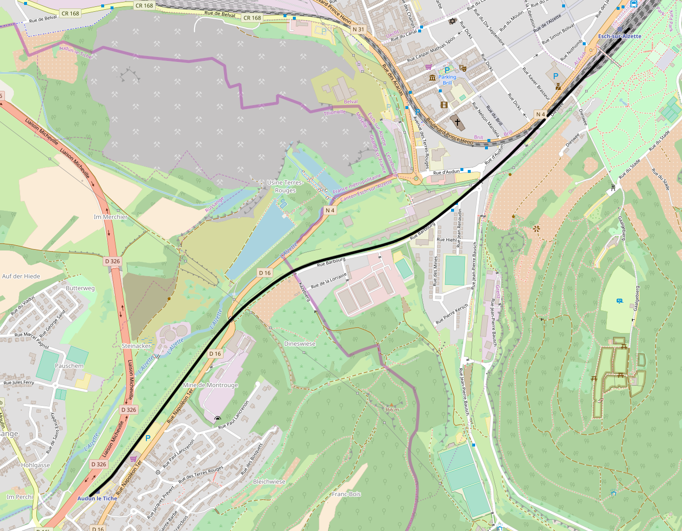 CFL line 6e, Esch-sur-Alzette - Audun-le-Tiche